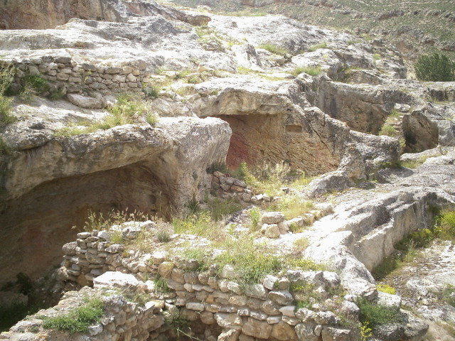 Contrebia_Leukade_Restos_Viviendas.